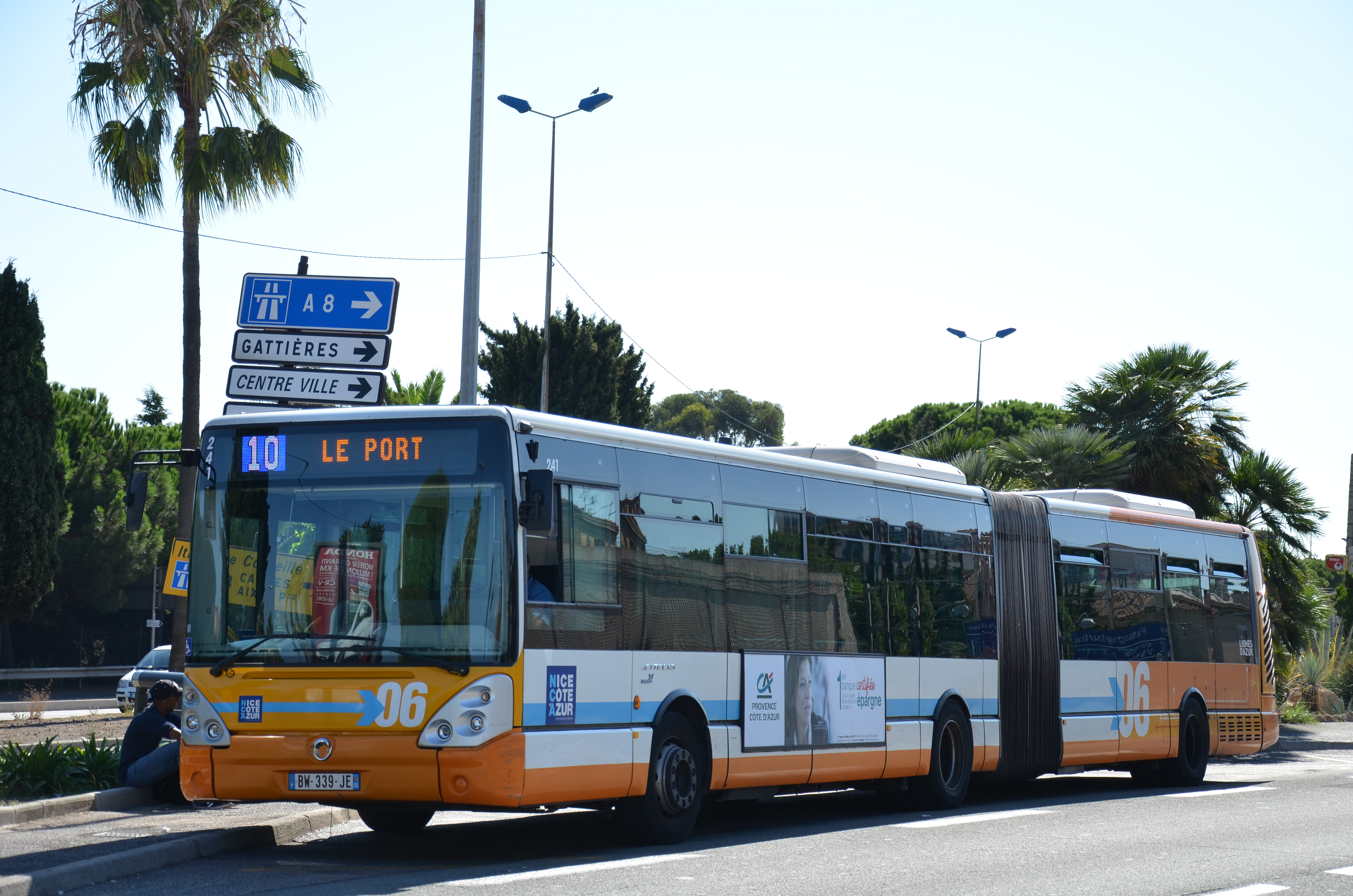 Irisbus Citelis 18 n°241 à son terminus, Saint-Laurent-du-Var Gare SNCF sur le réseau LIGNES D'AZUR de Nice.